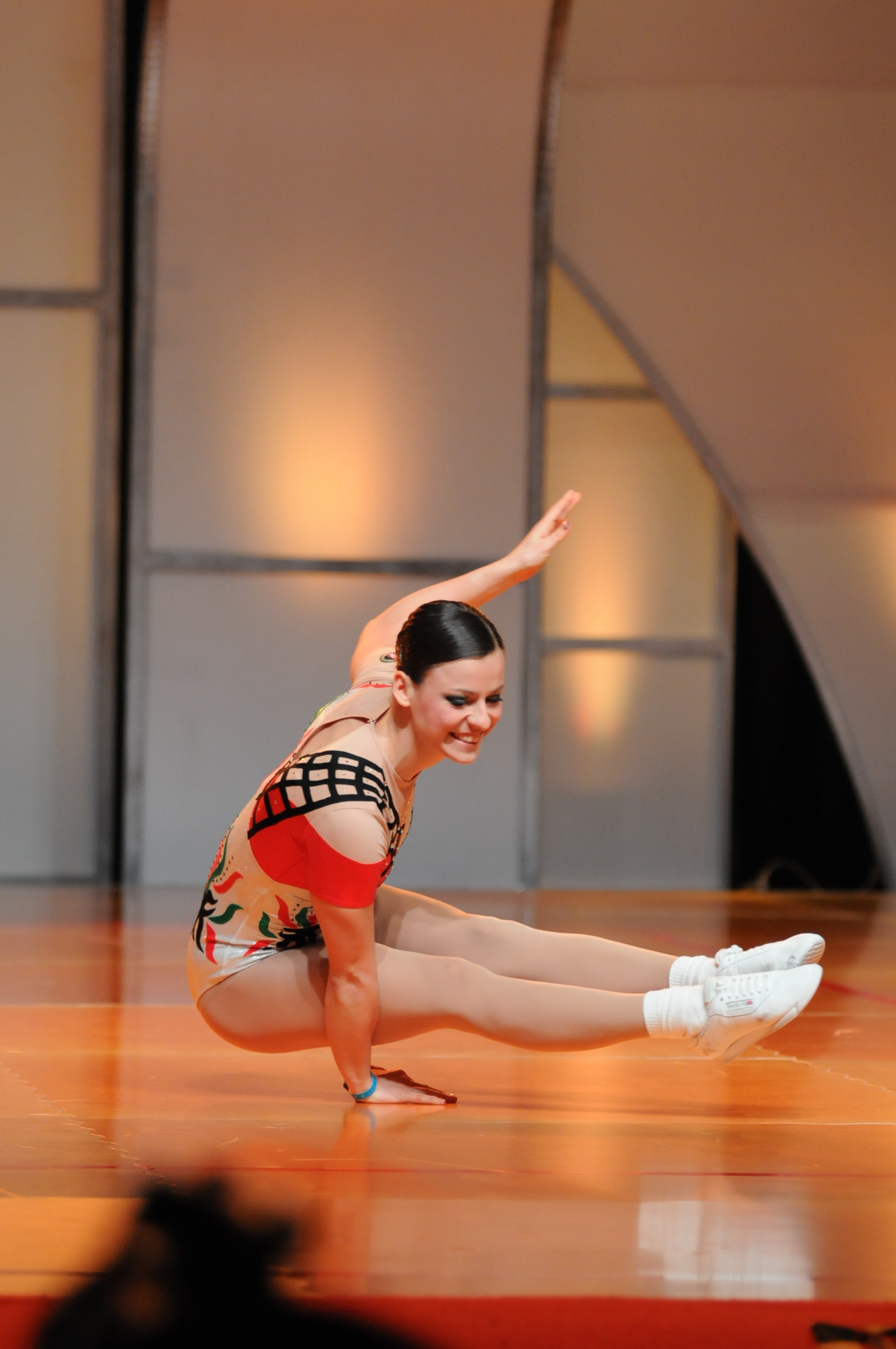 Lubi Gazov_Weltcup Vegas_Silber